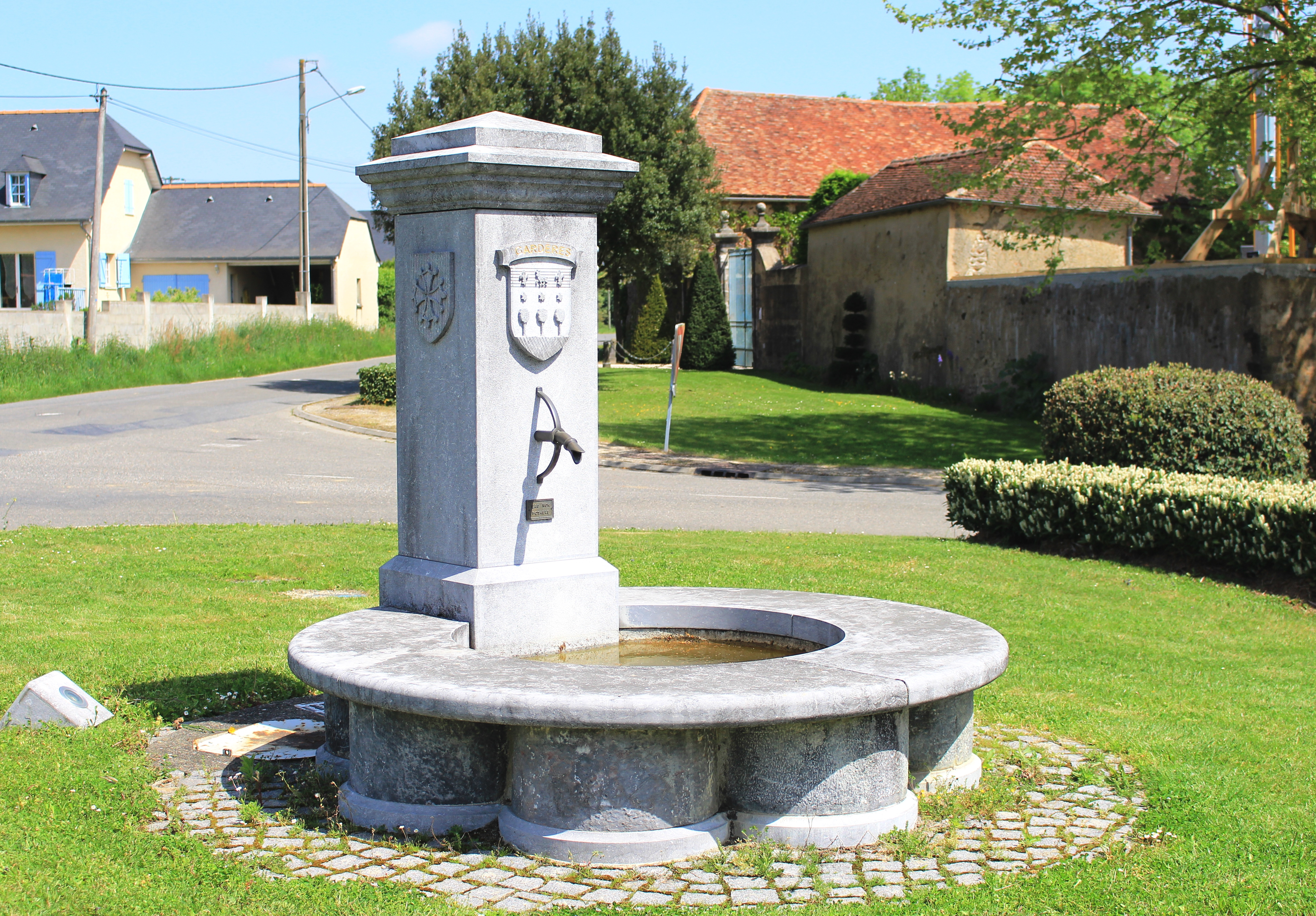 Fontaine de Gardères (Hautes-Pyrénées)